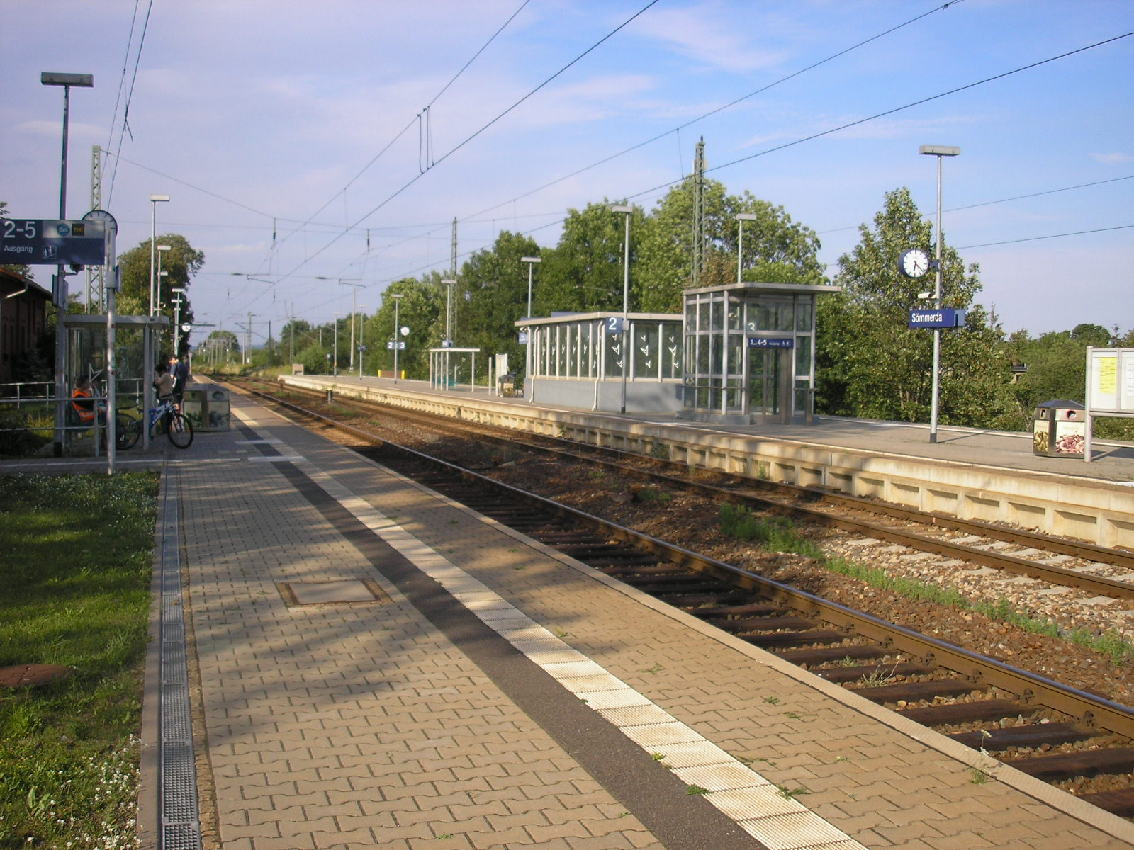 Der obere Bahnhofsteil des Turmbahnhofes Sömmerda (Thüringen): Bahnstrecke Erfurt-Sangerhausen